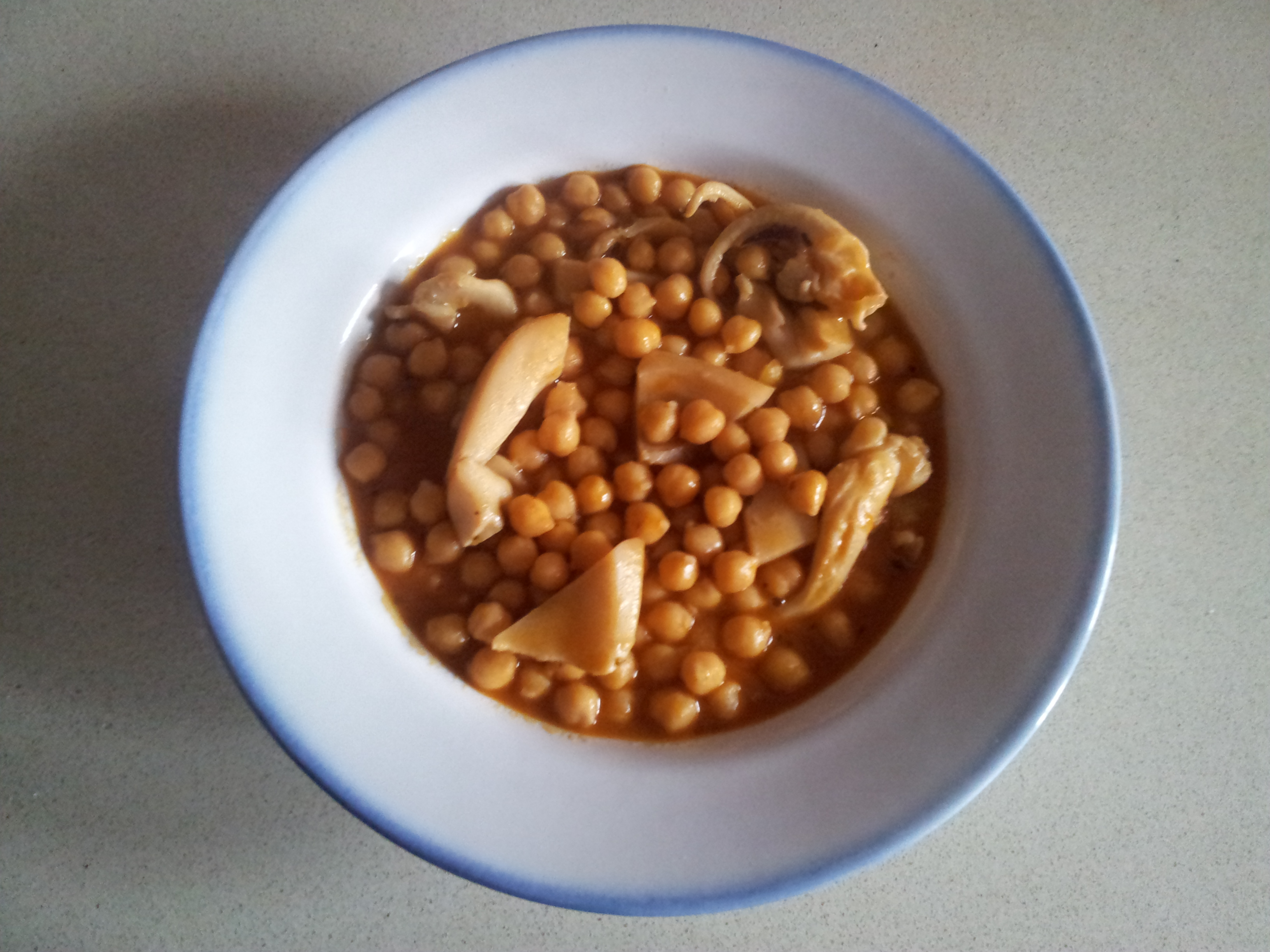 Garbanzos con chocos, Cádiz, España.